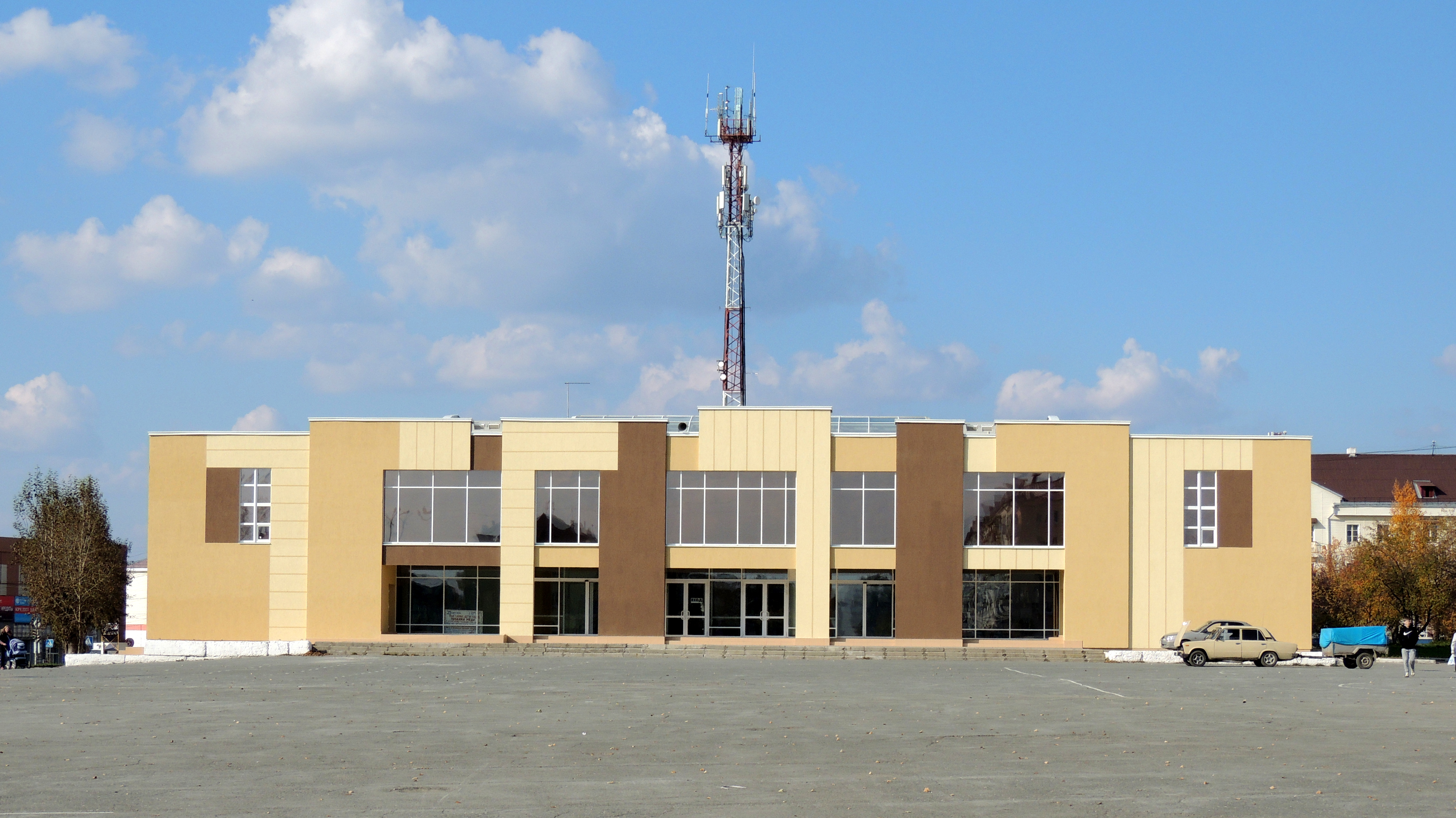 Дворец культуры города Карпинска